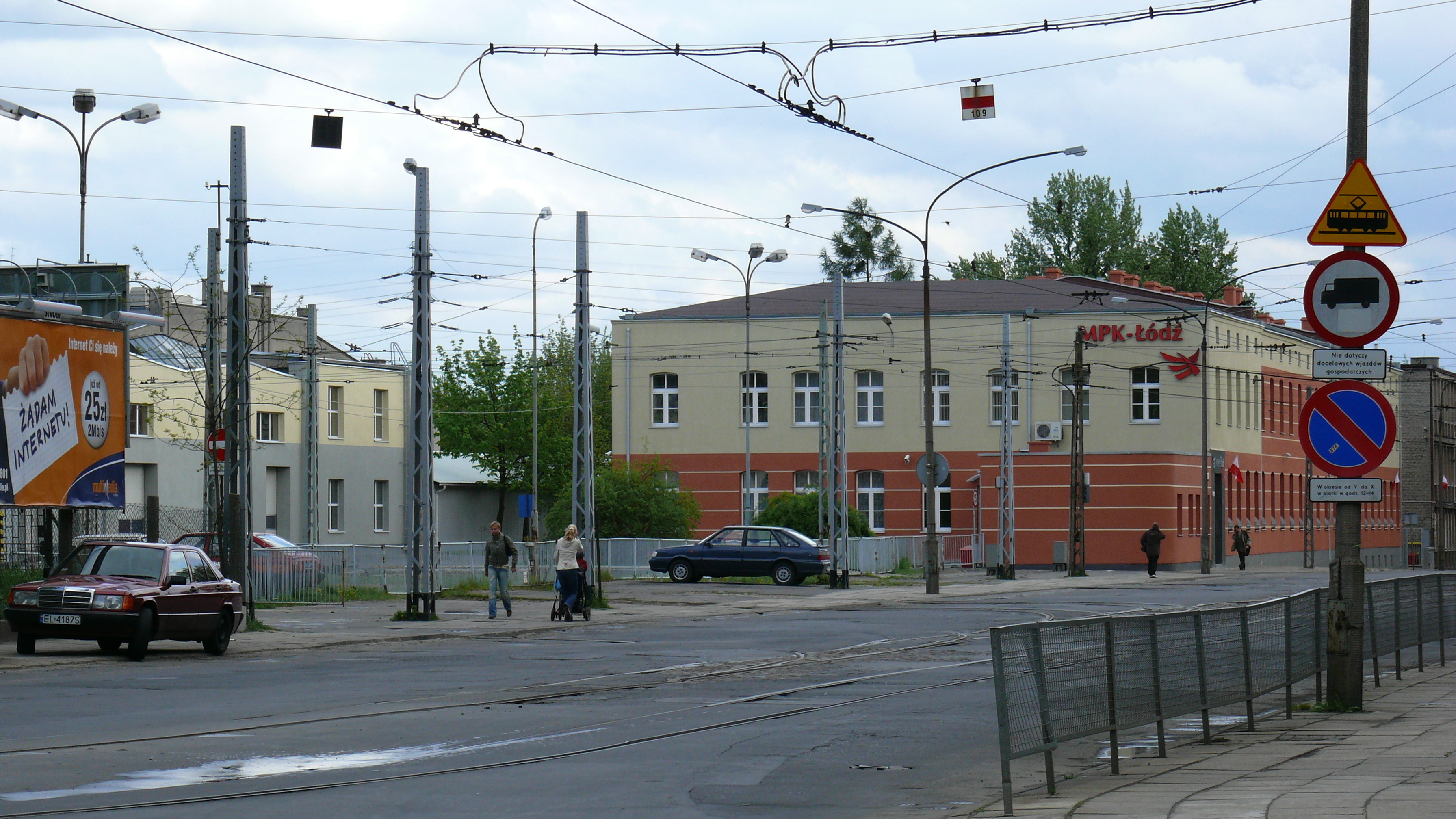 Budynek MPK Łódź przy ul. Tramwajowej w Łodzi